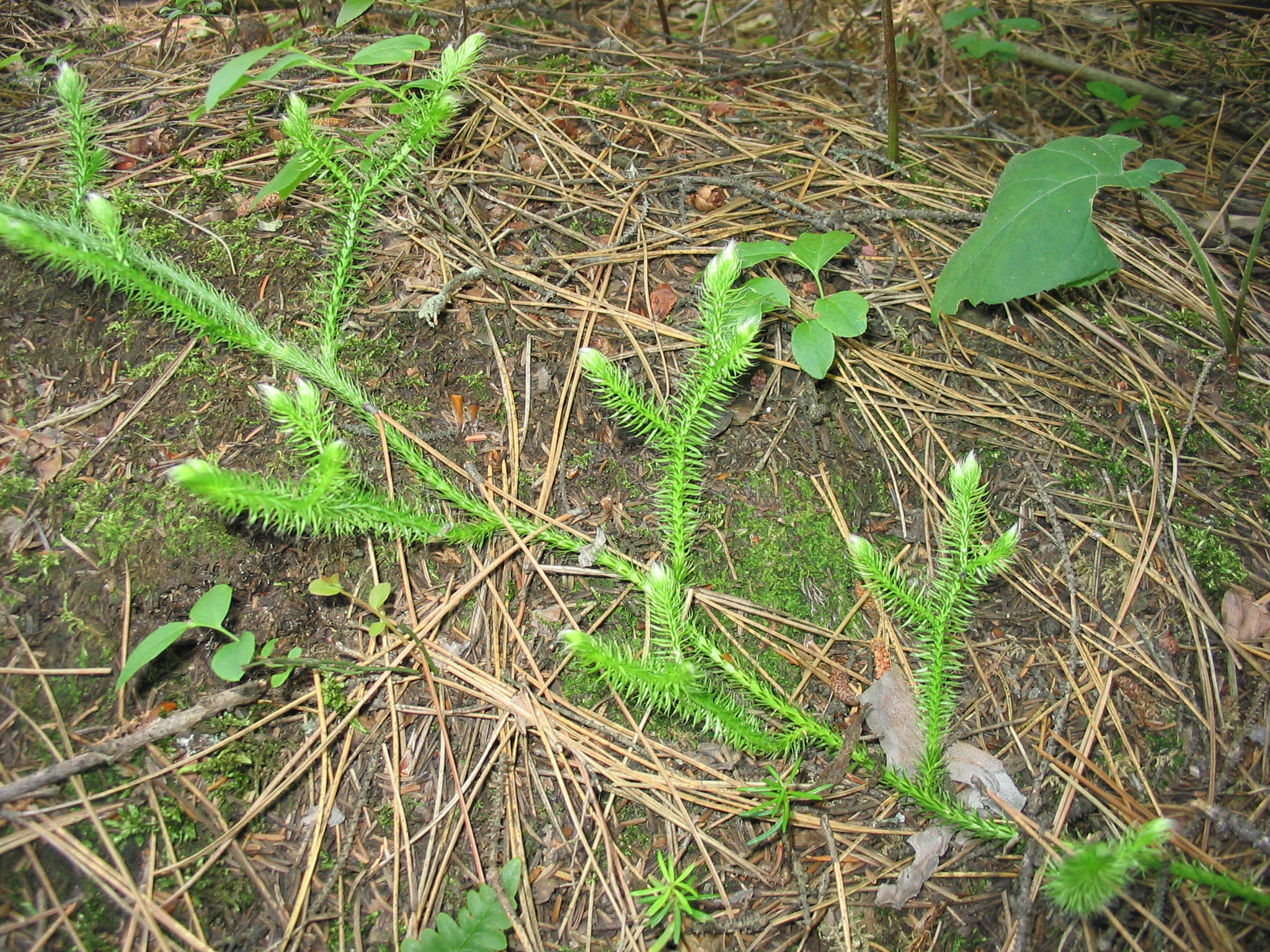 Lycopodium clavatum 2-eheep